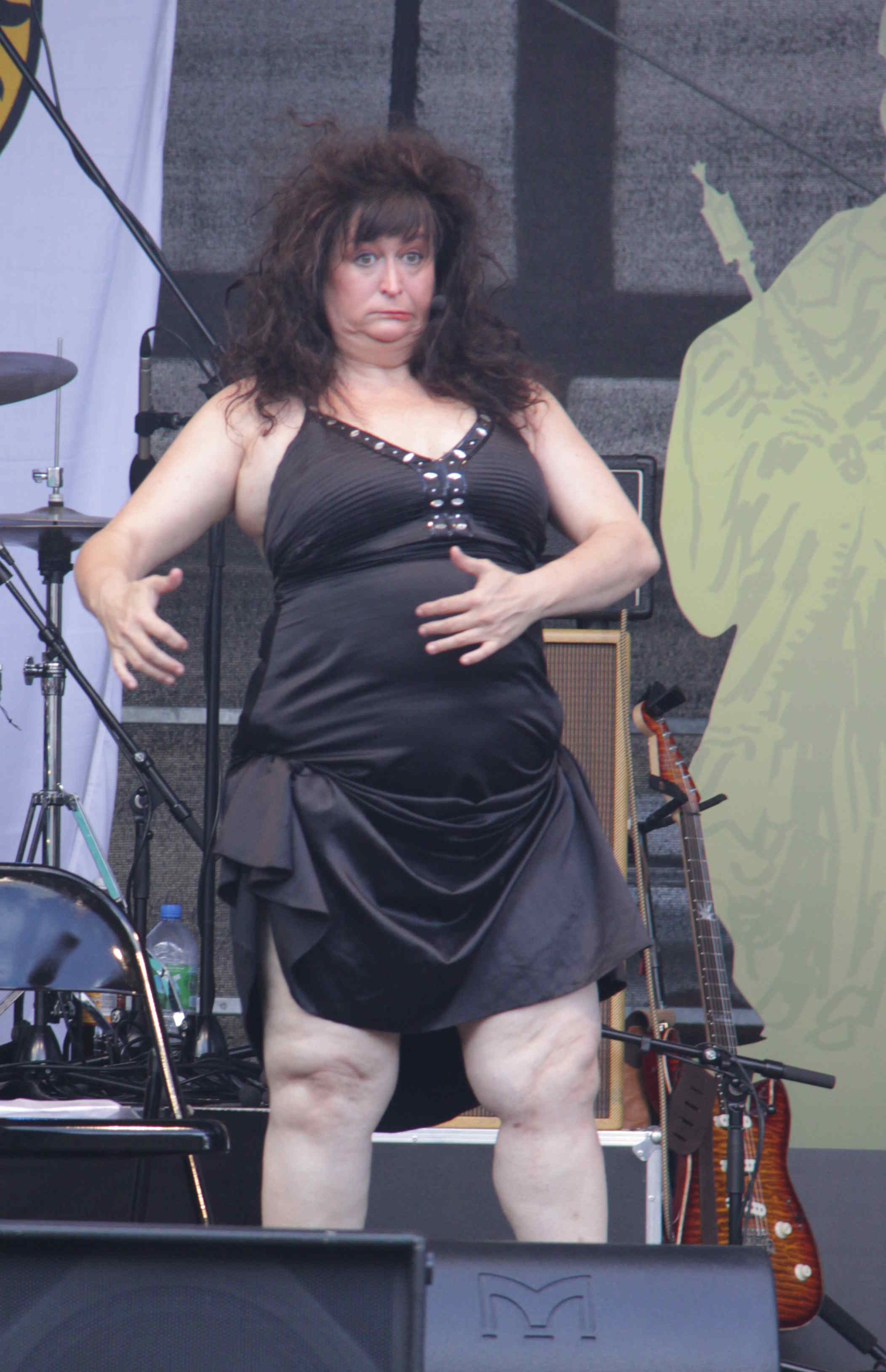 Lizzy Aumeier live in Schwabach